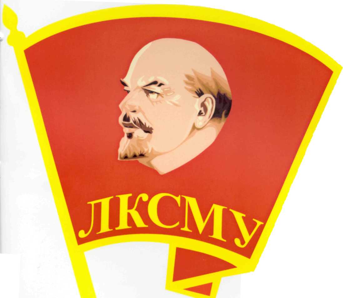 Емблема Ленінської комуністичної спілка молоді України. "Емблема ЛКСМУ являє собою характерно майоріючий прапор червоного кольору із зображенням в центрі профілю В. І. Леніна та абревіатури назви Спілки "Ленінська Комуністична Спілка Молоді України" виконаної золотими літерами "ЛКСМУ" внизу прапора (